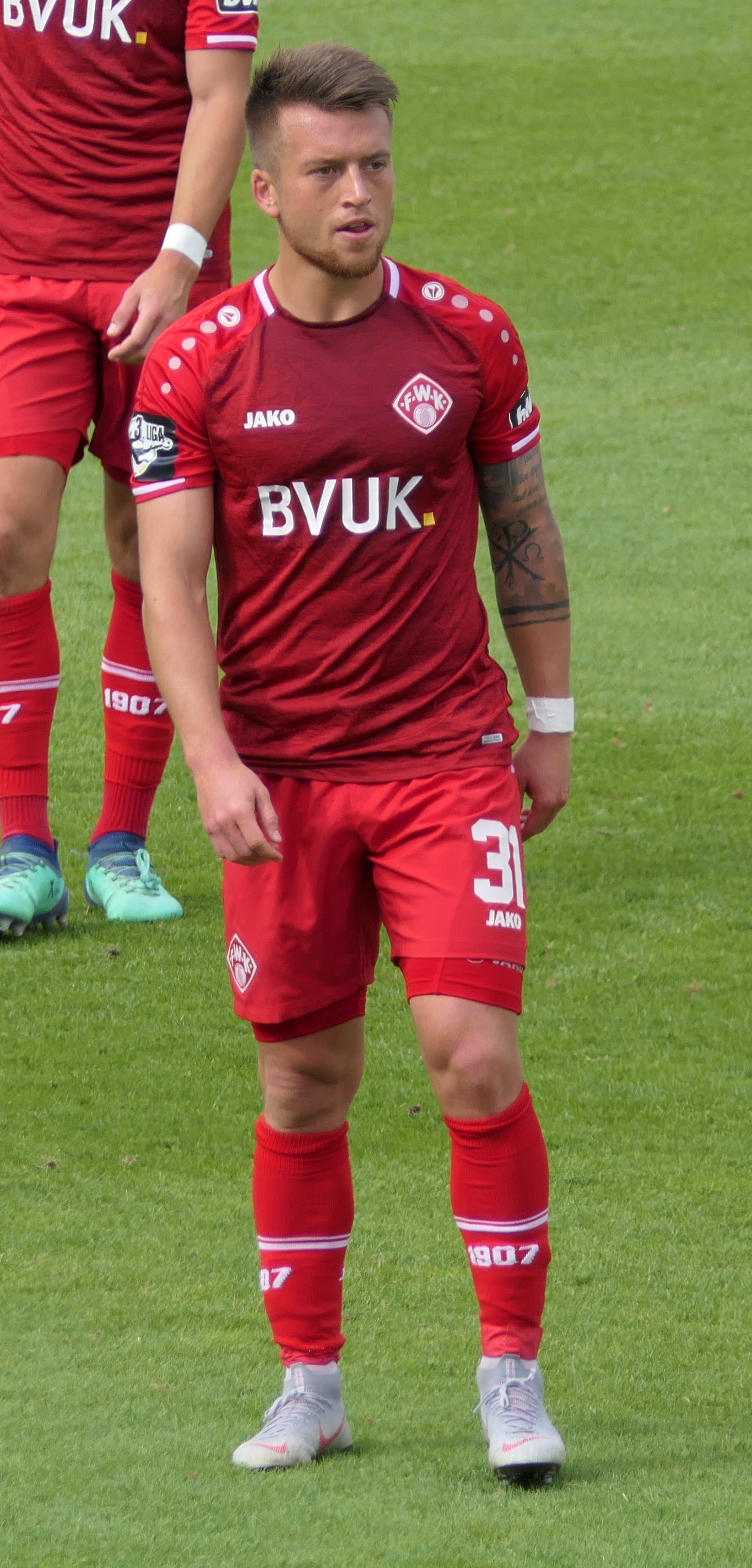 Der Fussballprofi Patrick Göbel im Trikot der Würzburger Kickers beim Heimspiel gegen Eintracht Braunschweig am 22.09.2018.